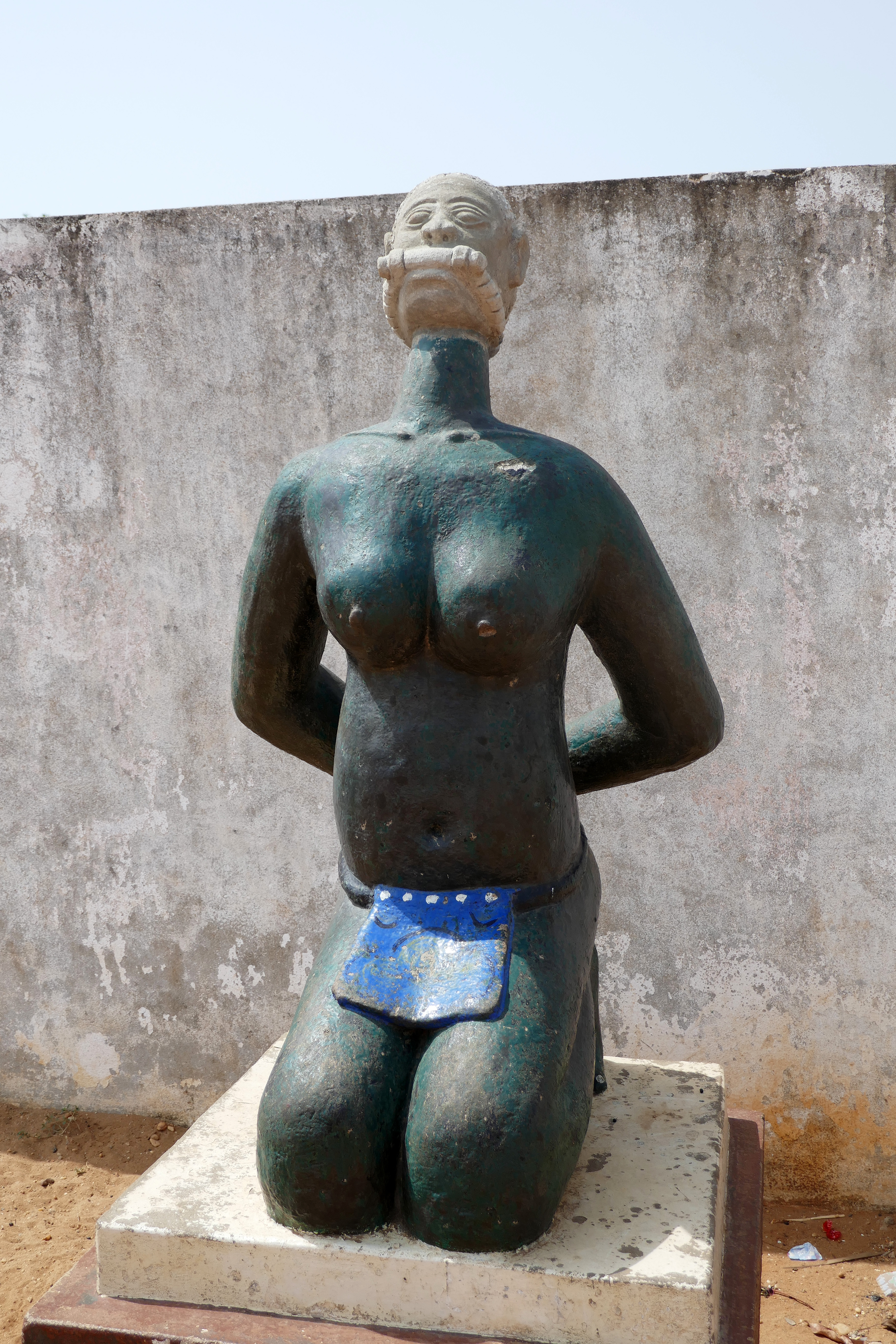 Mémorial de l'esclavage à Zoungbodji, près de Ouidah (département de l'Atlantique, Bénin).